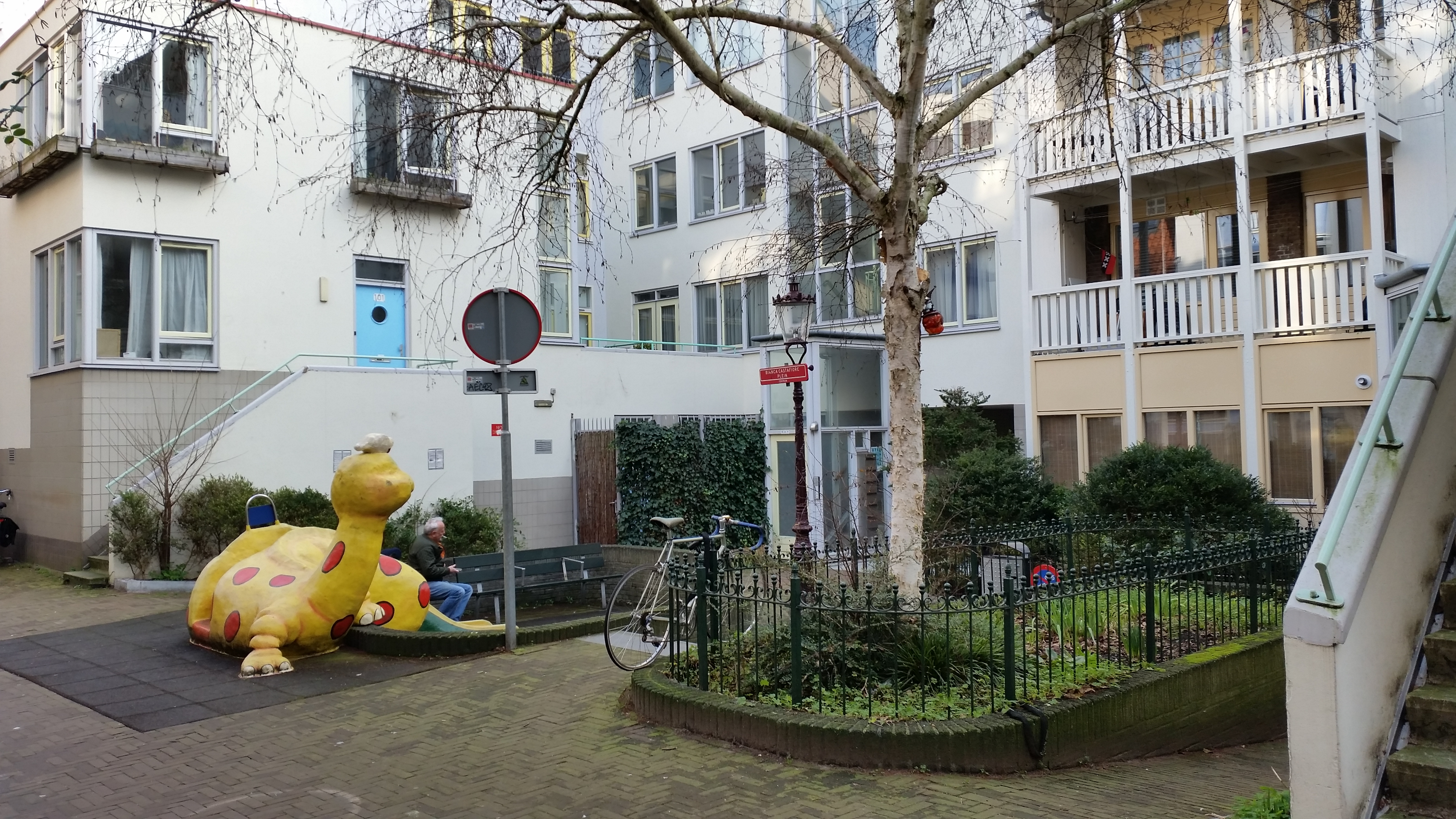 Het fictieve Bianca Castafioreplein in Amsterdam-Centrum in januari 2020